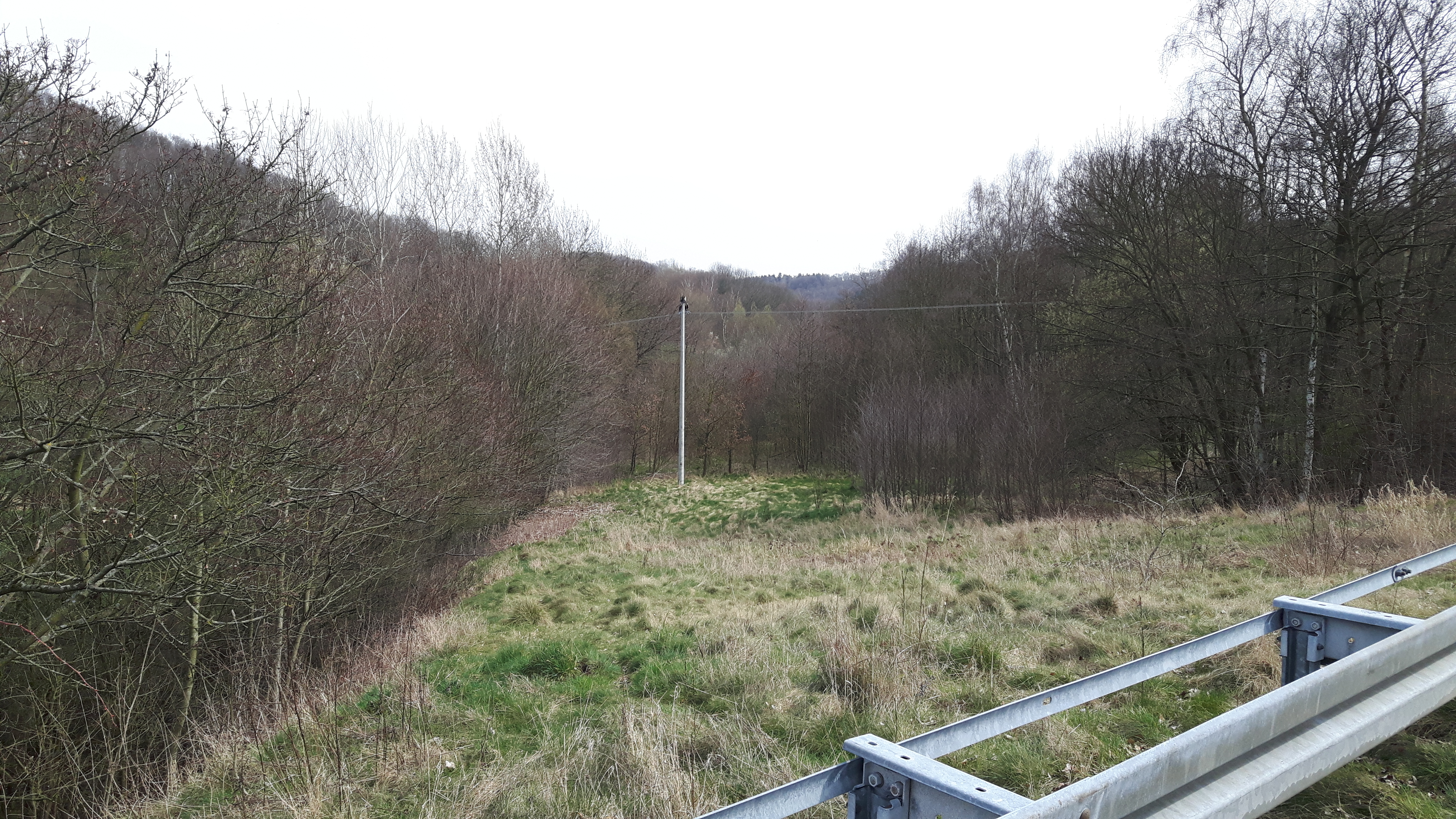 alte A4 im Triebischtal